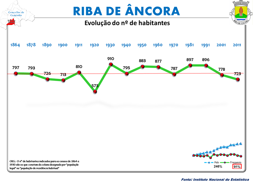 Censos 1864/2011